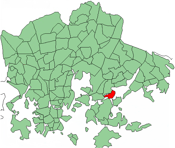 A map of Helsinki highlighting Tammisalo